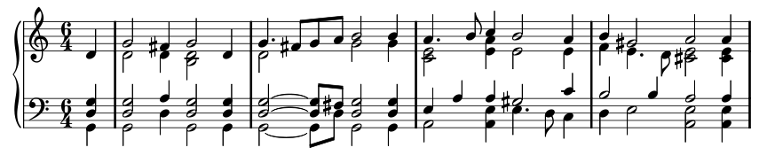 Premières mesures de la pièce anonyme intitulée Martin sayd to his man, extraite du Fitzwilliam Virginal Book n° 212